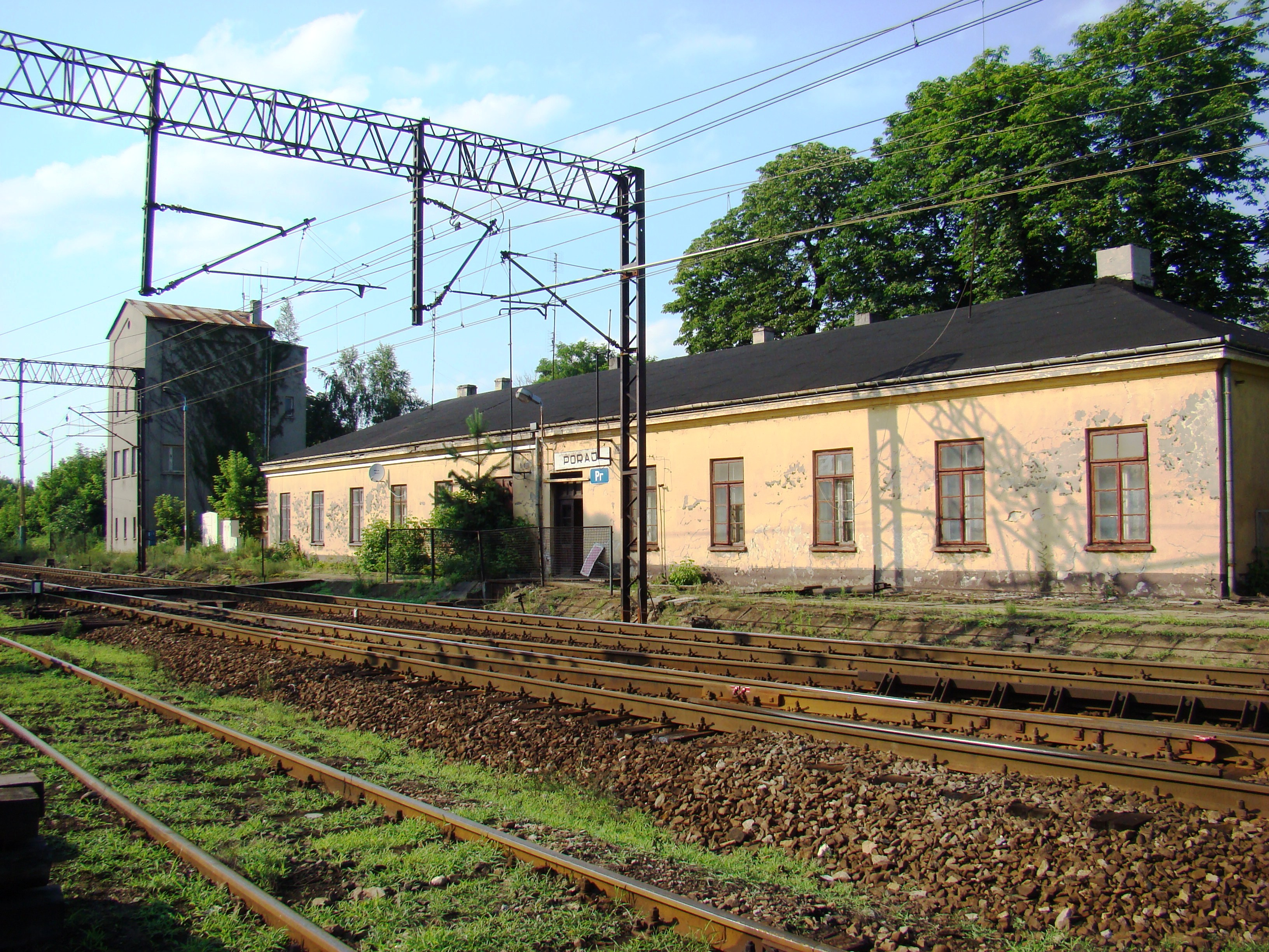 Dawny dworzec kolei warszawsko-wiedeńskiej w Poraju, wybudowany w latach 1847-49